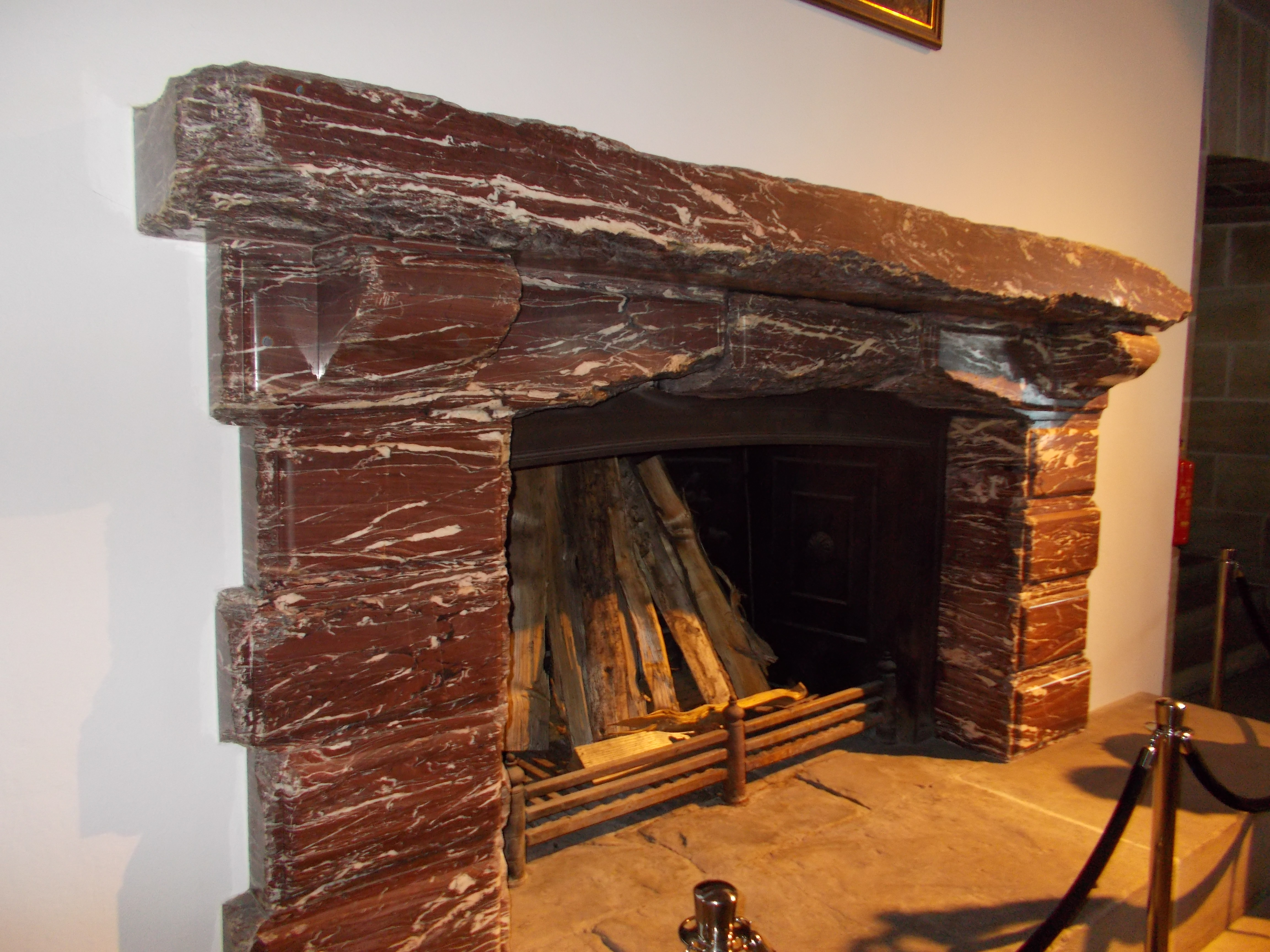 83471 Berchtesgaden, Germany